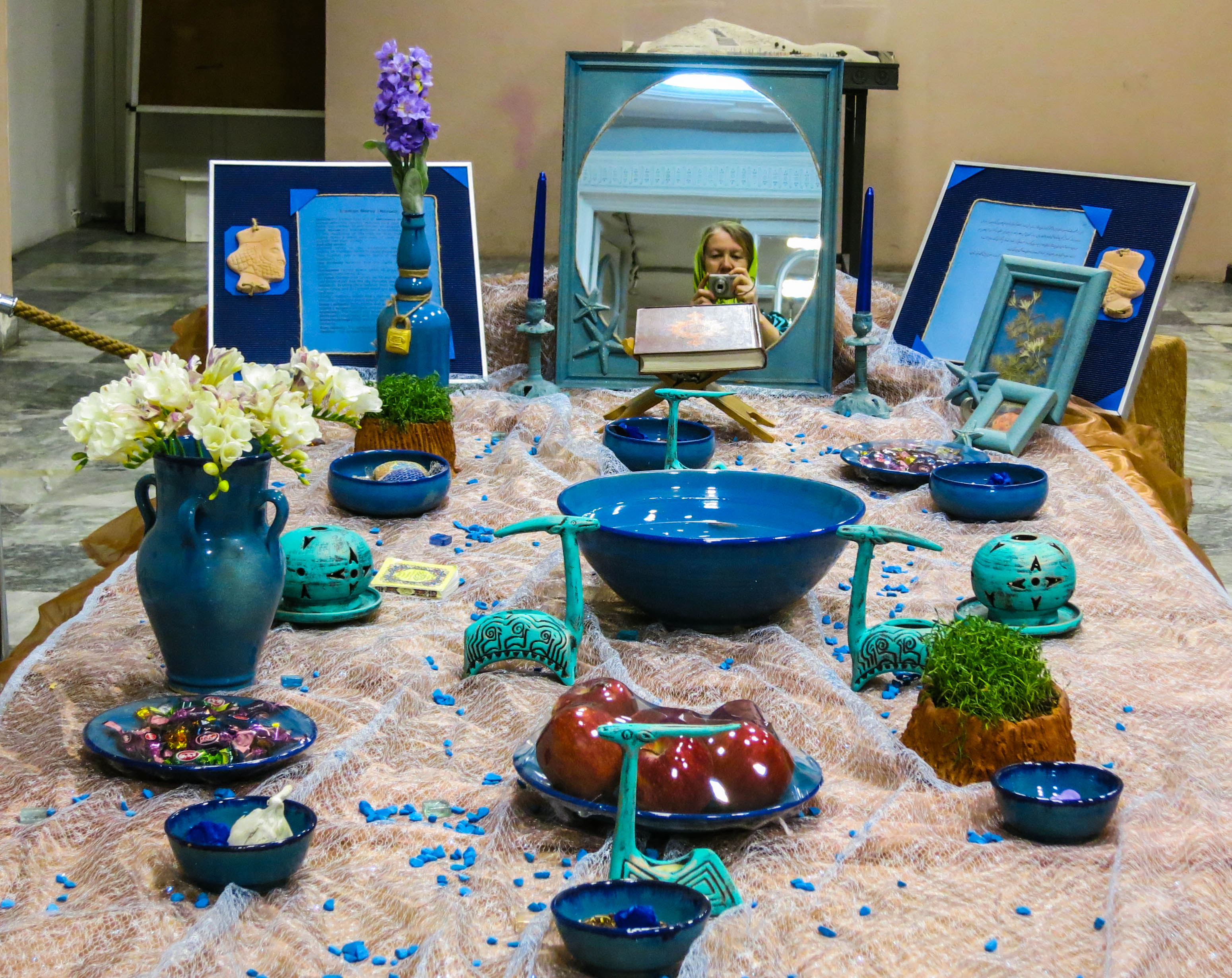 Nowruz in Tehran